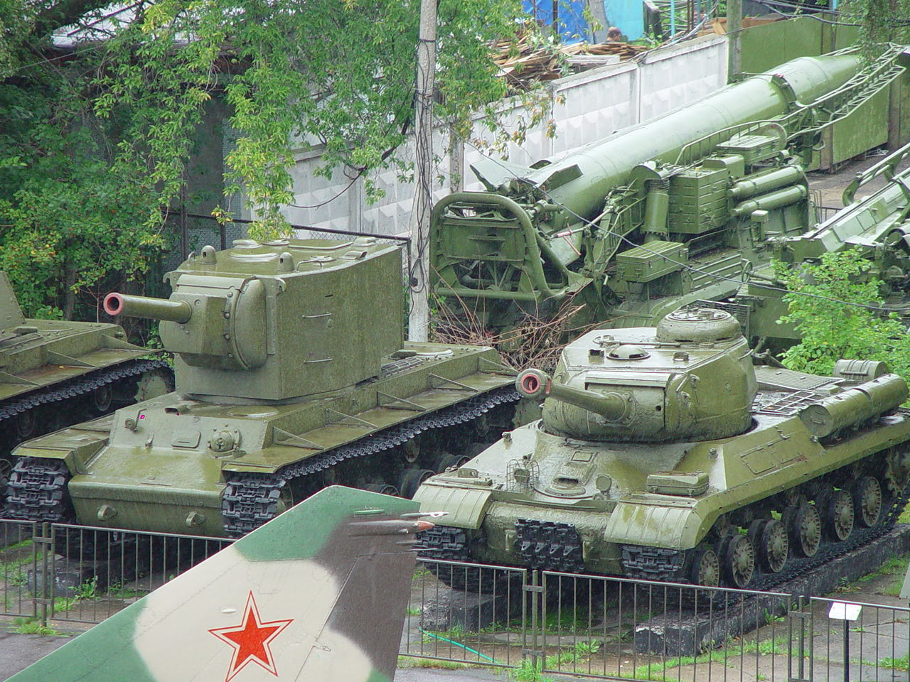 техника 2-й мировой